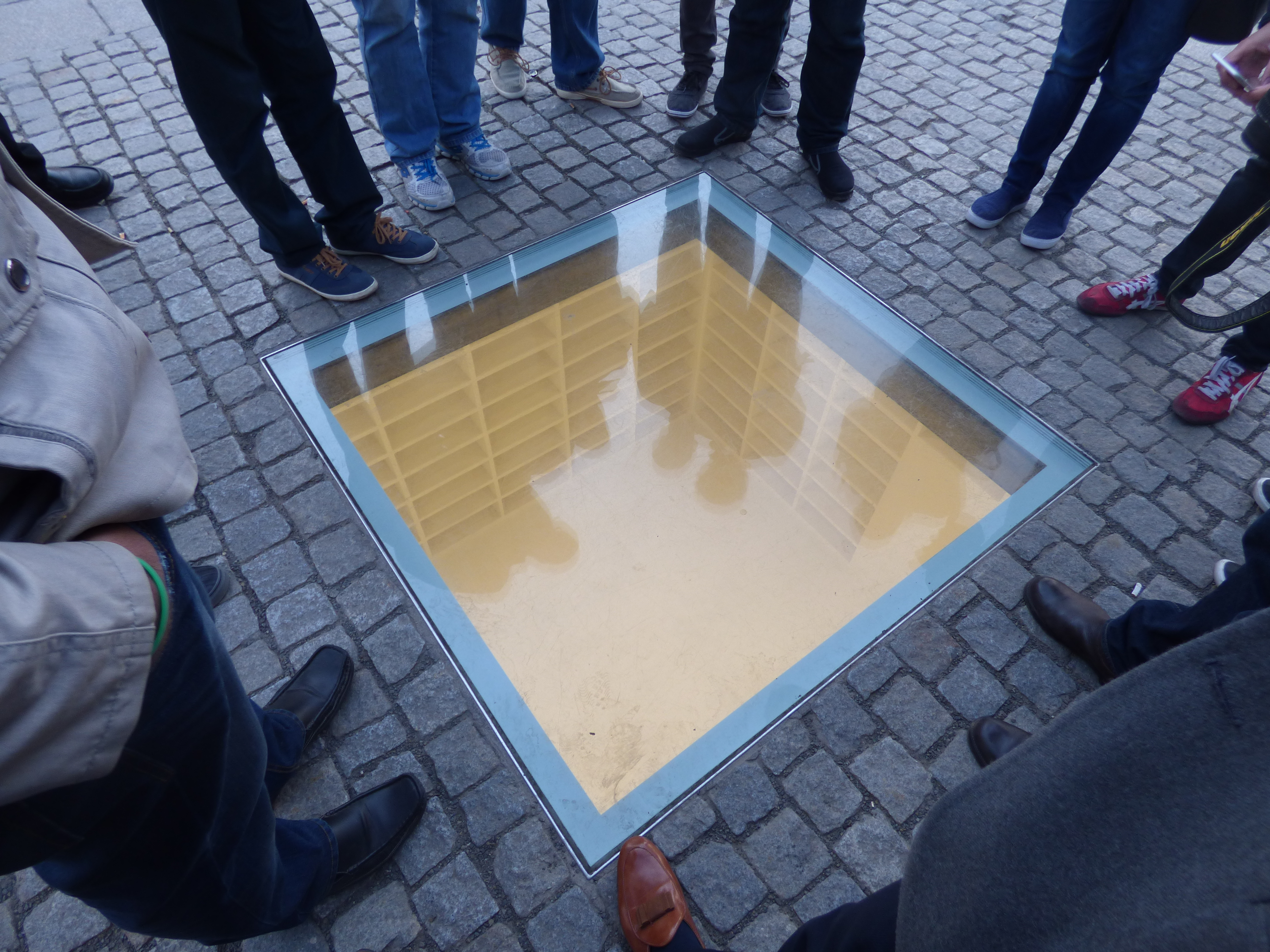 Memorial de los libros quemados en Bebelplatz, Berlín